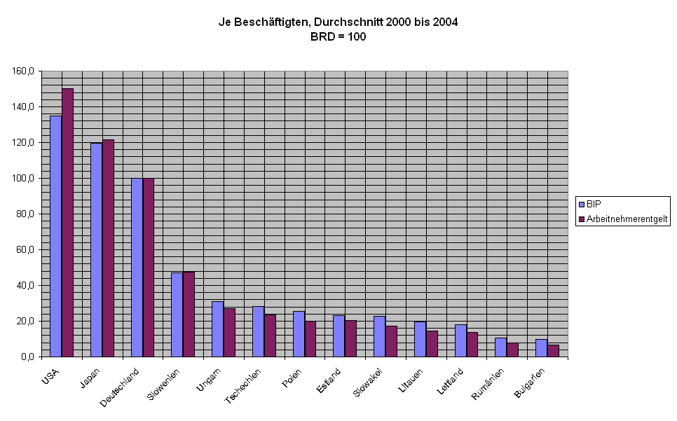 Arbeitnehmerentgelt (€) und BIP (€) je Beschäftigten, Durchschnitt 2000 bis 2004, BRD gleich 100 gesetzt, für USA, Japan und osteuropäische Länder